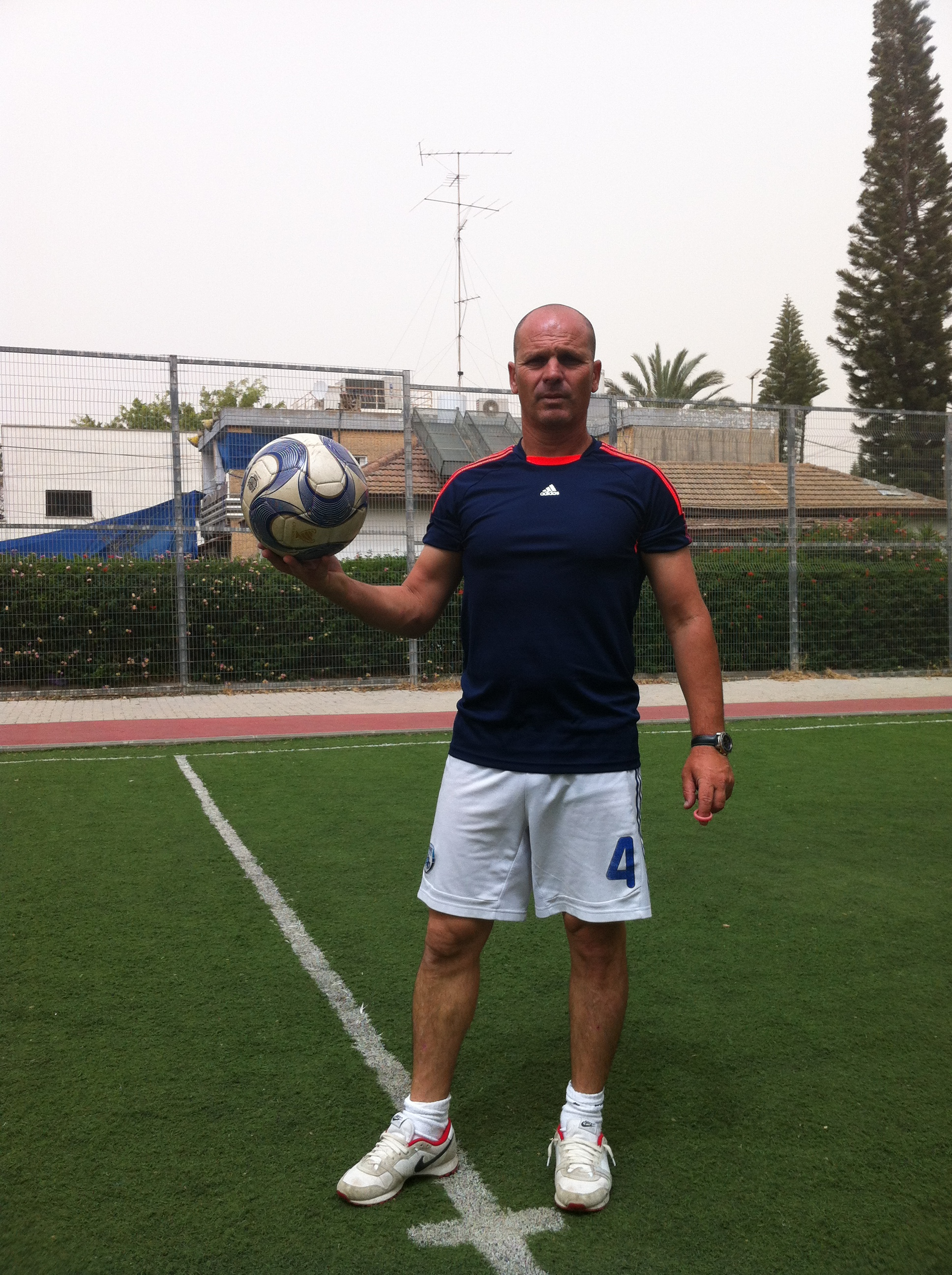 ג'קי צרפתי במגרש מוכן לאמן את הילדים